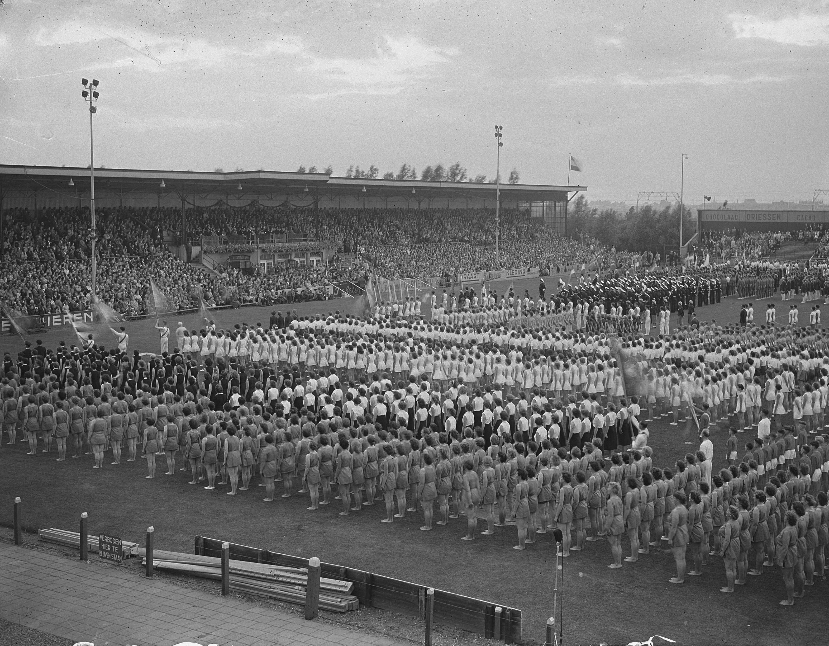 Collectie / Archief : Fotocollectie Anefo Reportage / Serie : [ onbekend ] Beschrijving : Gymnastrada in Spartastadion aanwezigheid van koninklijk paar Datum : 15 juli 1953 Instellingsnaam : Sparta Fotograaf : Bilsen, Joop van / Anefo Auteursrechthebbende : Nationaal Archief Materiaalsoort : Glasnegatief Nummer archiefinventaris : bekijk toegang 2.24.01.09 Bestanddeelnummer : 905-8394